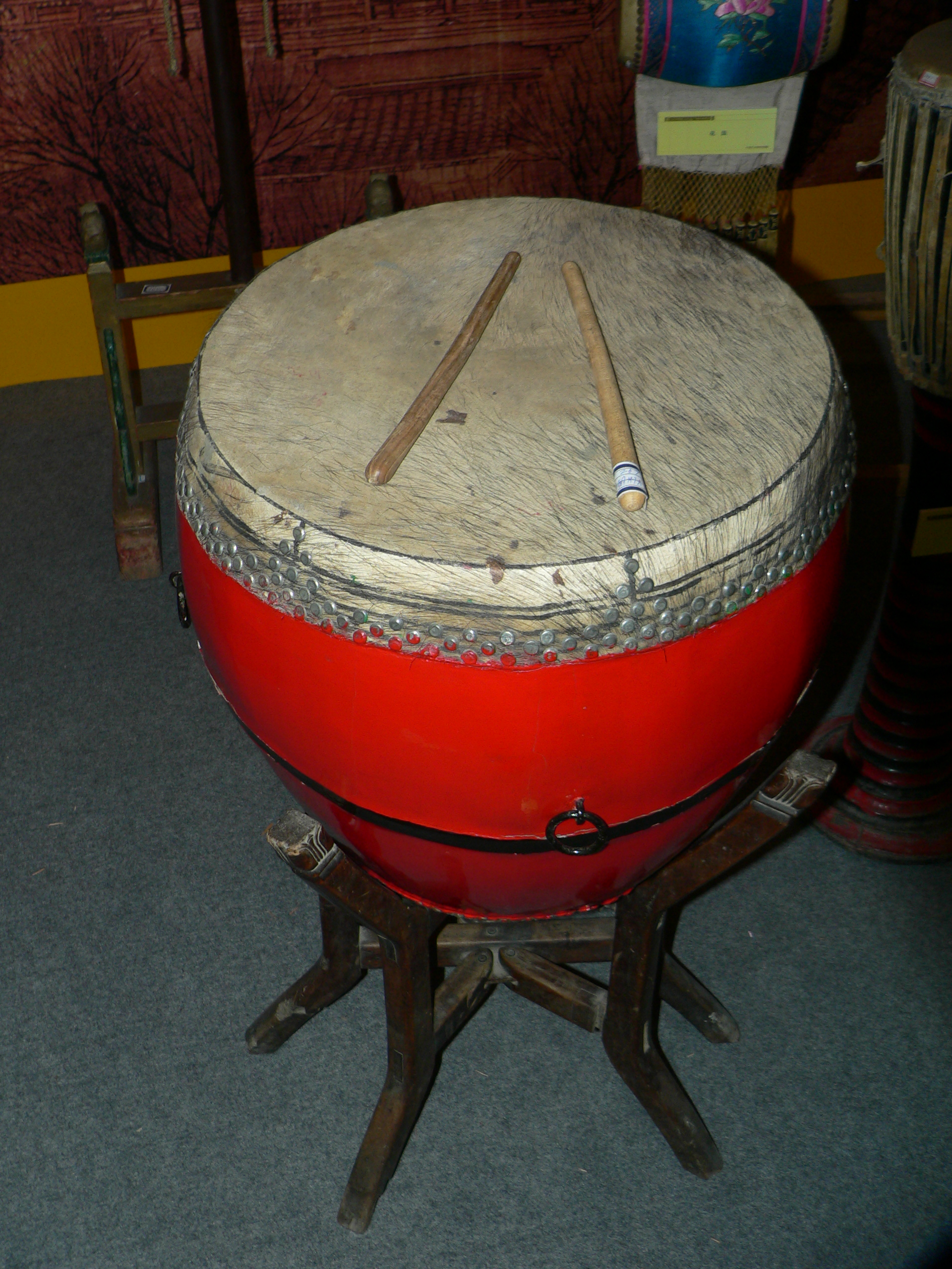 潮州大鼓 地点：摄于中国国家图书馆之非物质文化遗产保护成果展 时间：2006年2月18日 北京2006年第一次考察团 拍摄者：用心阁